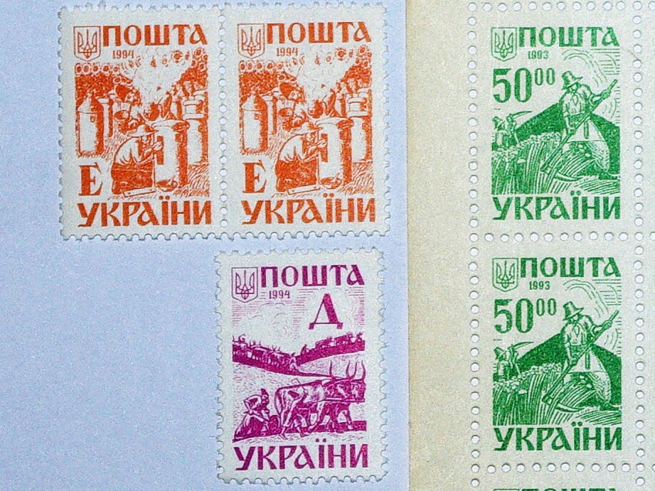 Украинские стандартные и безноминальные почтовые марки